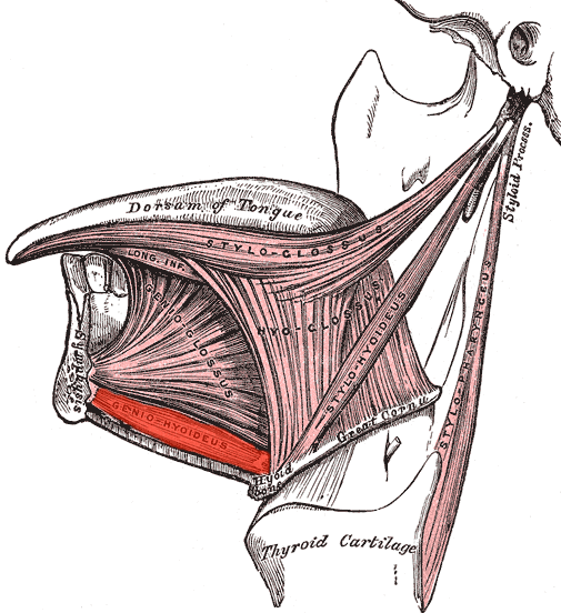 Geniohyoideus muscle